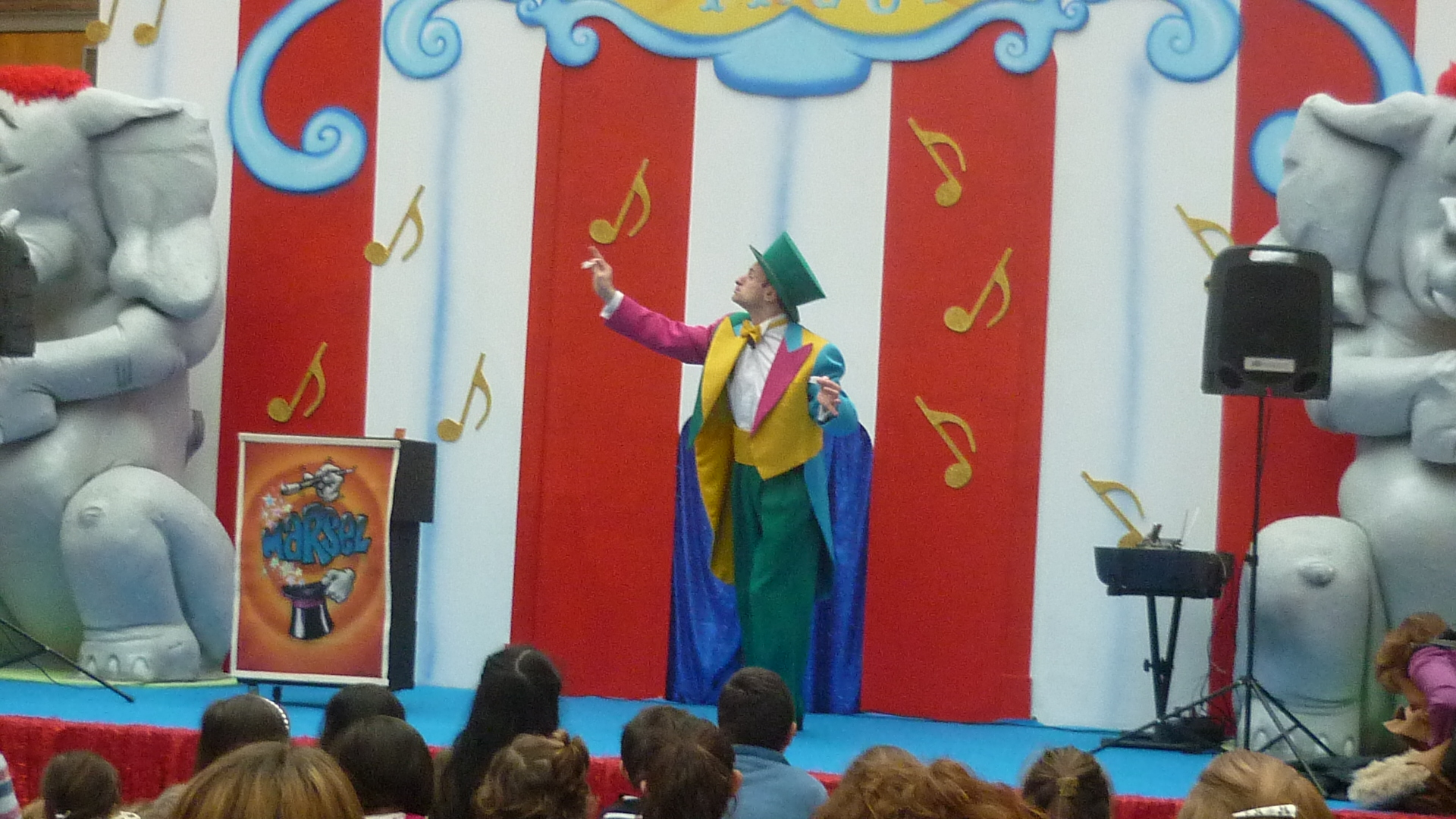 Marsel magoa.